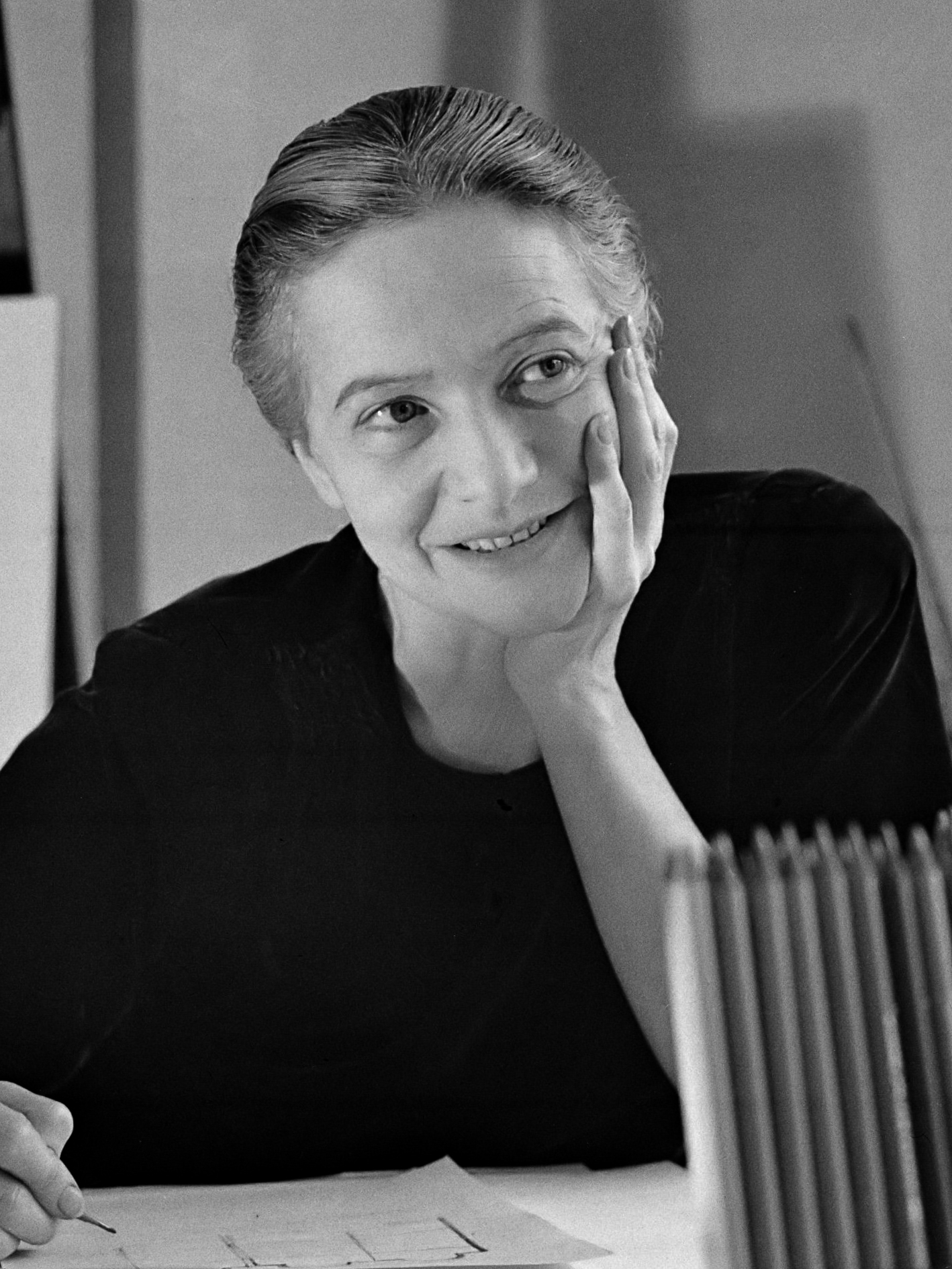 De Oostenrijkse kunstenaresse Mariette Lydis (1887-1970) aan haar tekentafel, 55 Rue Boileau in Parijs oktober 1936